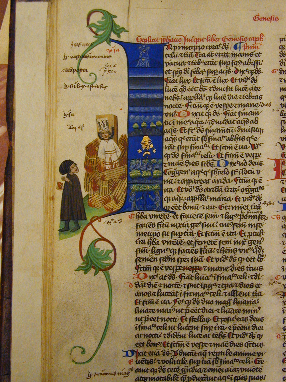 Initiale I der Martinitz-Bibel, fol 11v. Mutmaßlich die älteste Darstellung des Jan Hus.